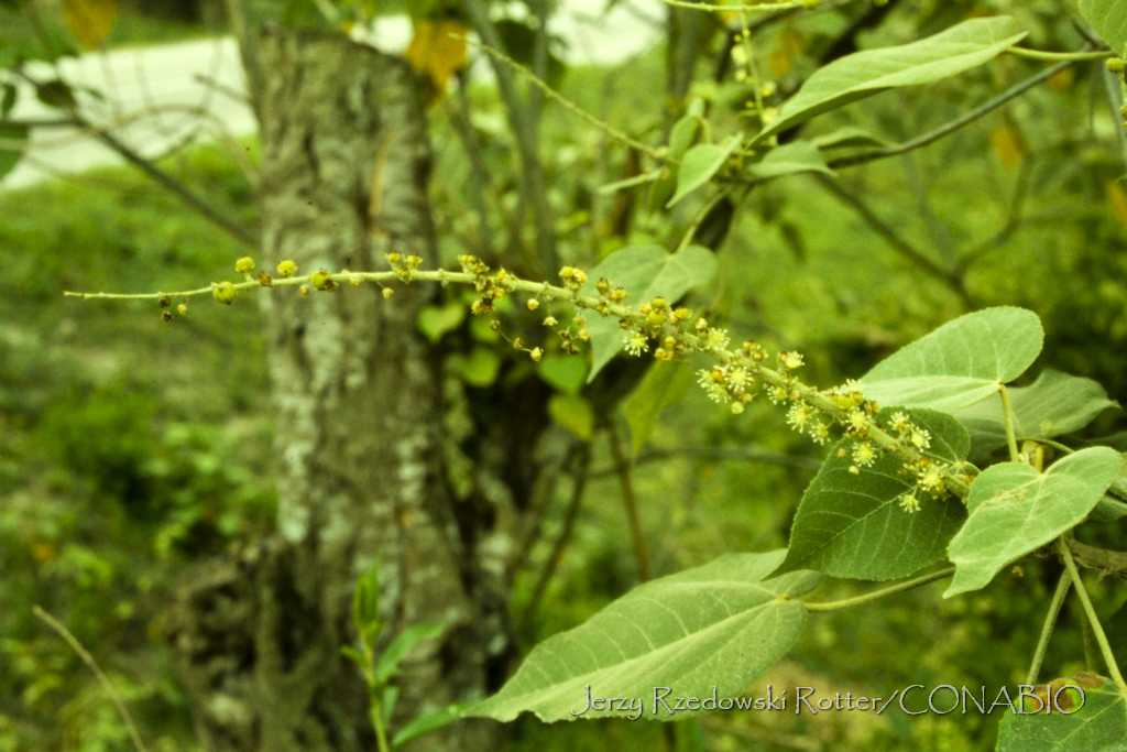 Croton draco, sangre de drago, feuilles et inflorescence (photo de Jerzy Rzedowski Rotter / CONABIO)